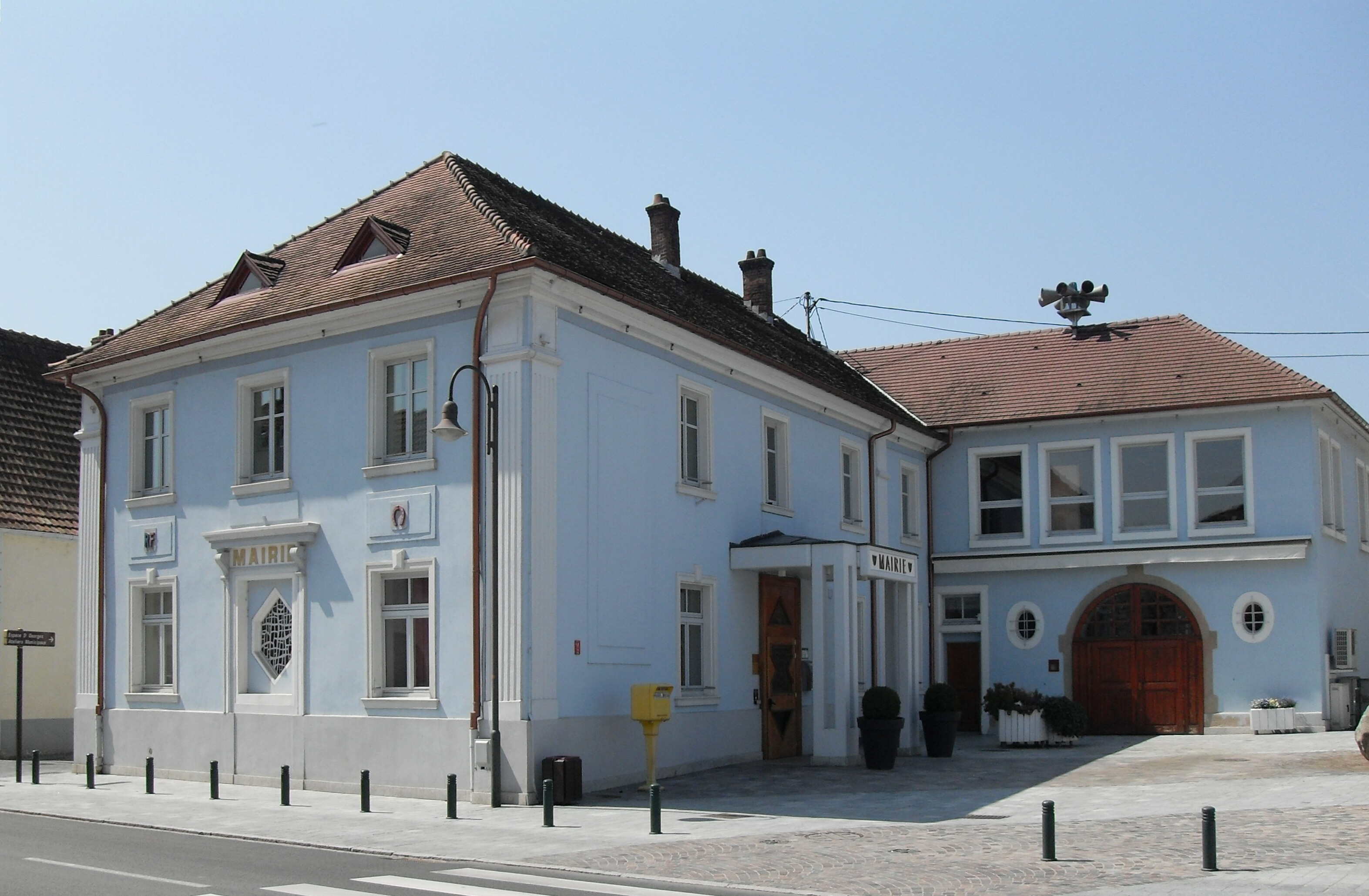 La mairie de Brunstatt